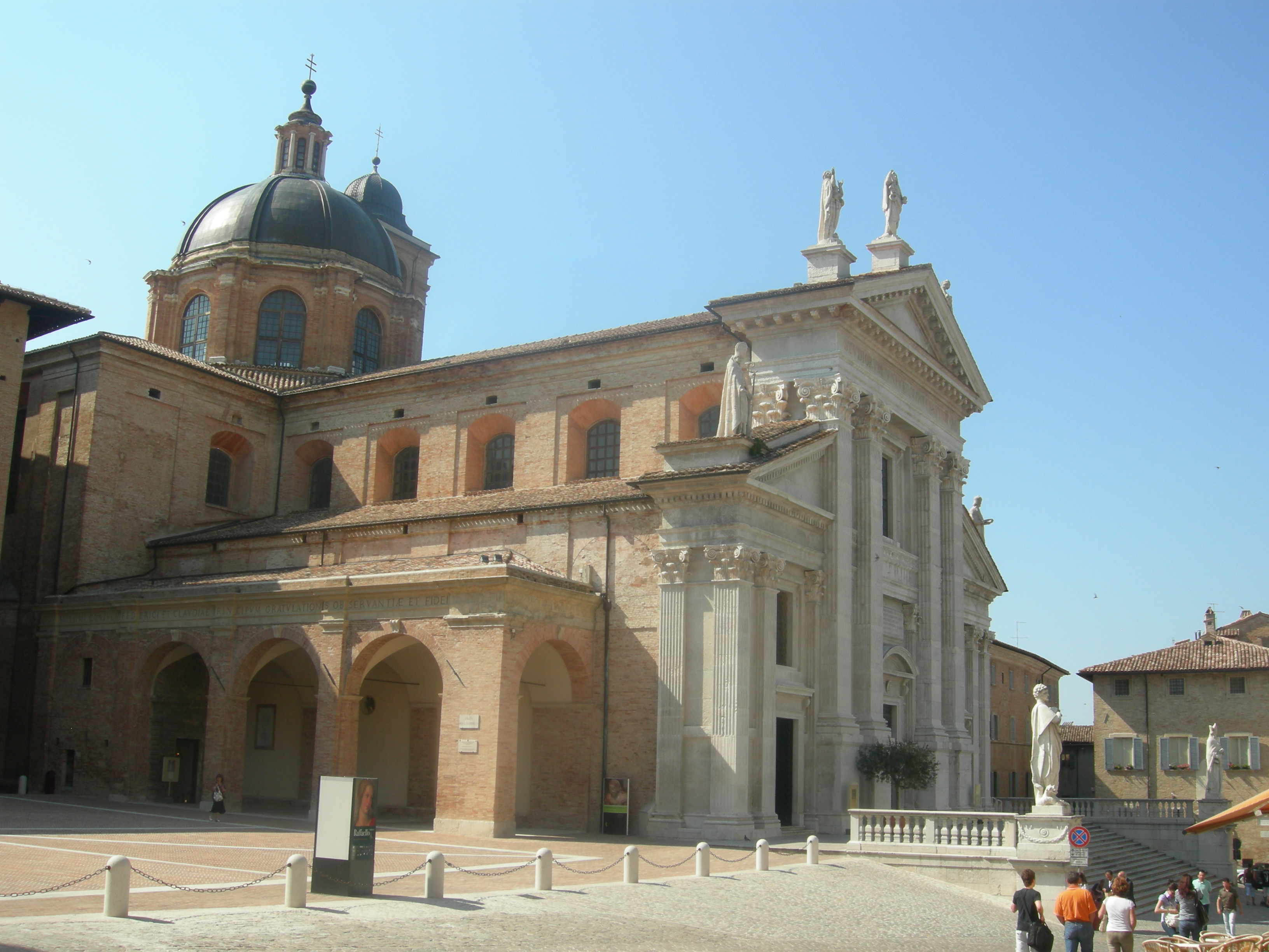 Veduta esterna del Duomo di Urbino, Italia.